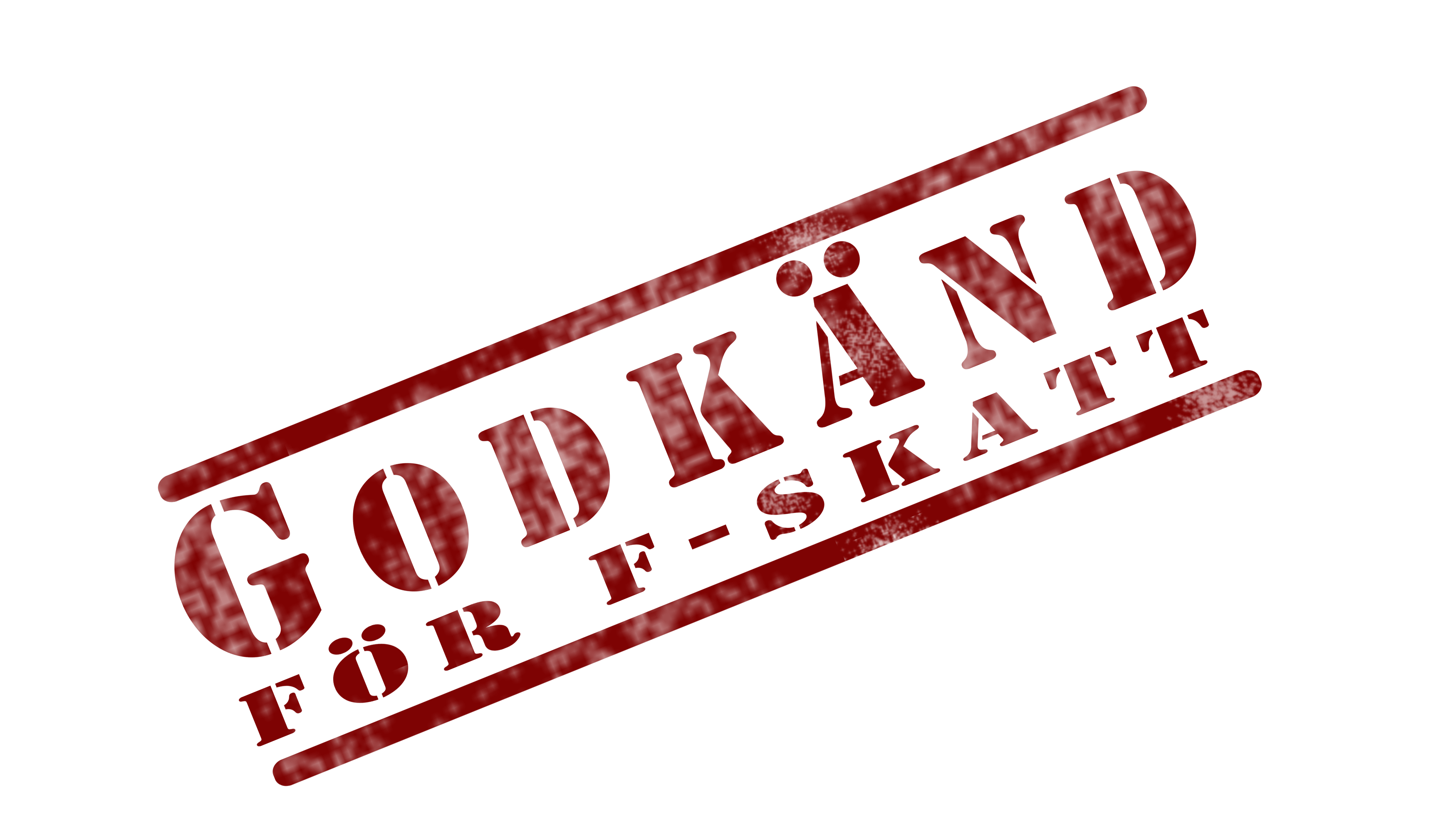 Texten "Godkänd för F-skatt" utformad som en stämpel. Kan med fördel användas på webbsidor eller fakturor.